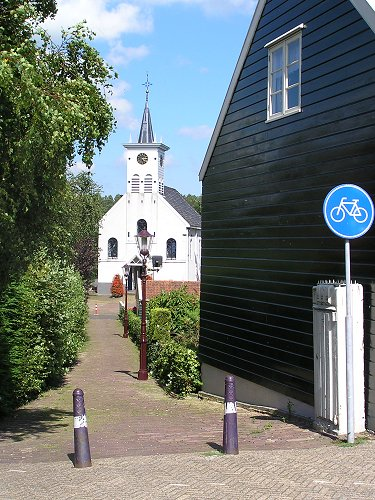 De kerk van Schellingwoude, gezien vanaf de dijk. Foto juli 2005.